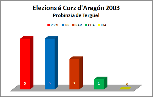 Aragonés: Grafico d'as elezions á Corz d'Aragón de la añada 2003. Resultatos d'a probinzia de Tergüel.